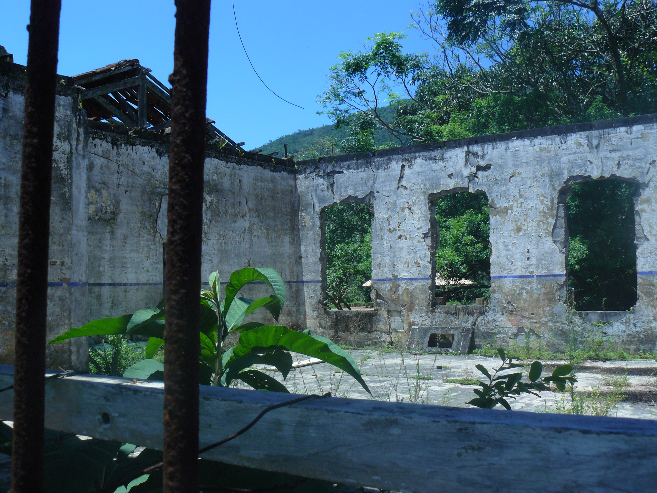 Ruinas do Presidio Anchieta - Parque Nacional da Ilha Anchieta - Ubatuba - São Paulo - Brasil